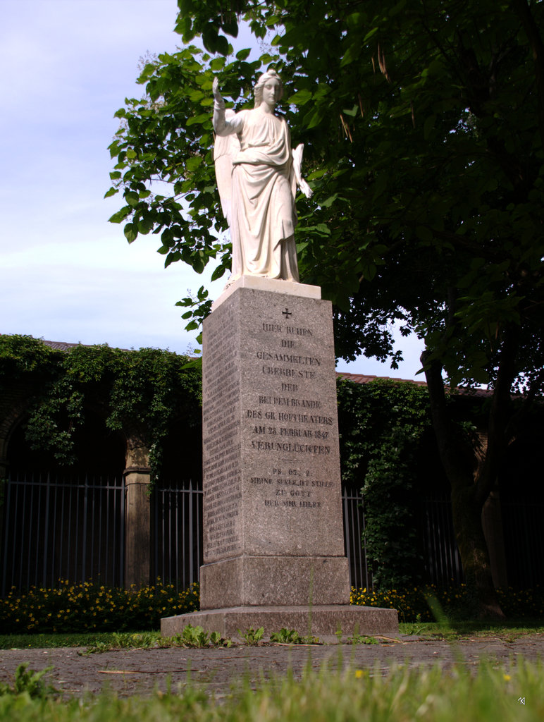 Denkmal für die Verstorbenen durch den Brand des Hoftheaters am 28. Februar 1847.